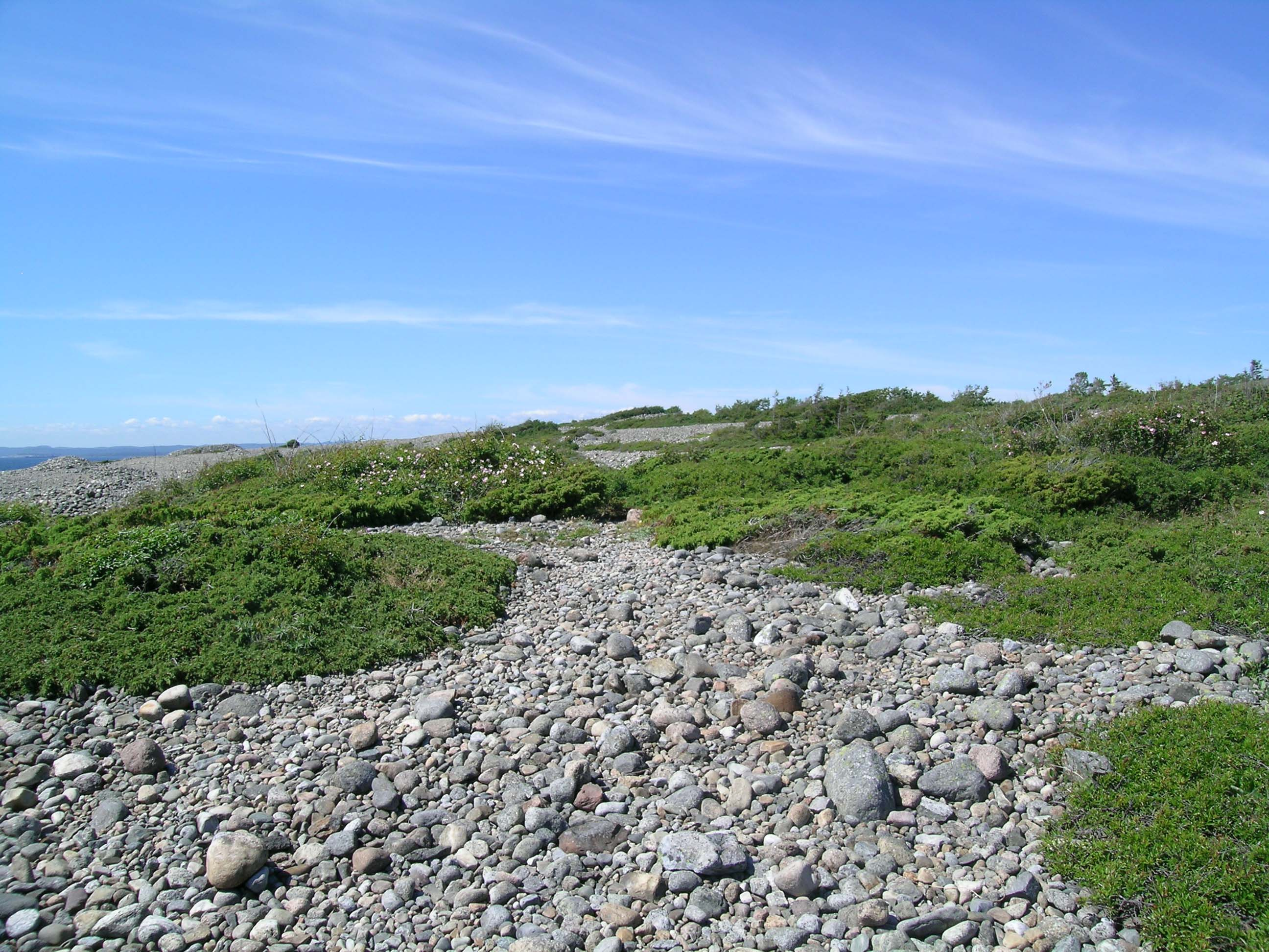 Mølen, Larvik, Norway